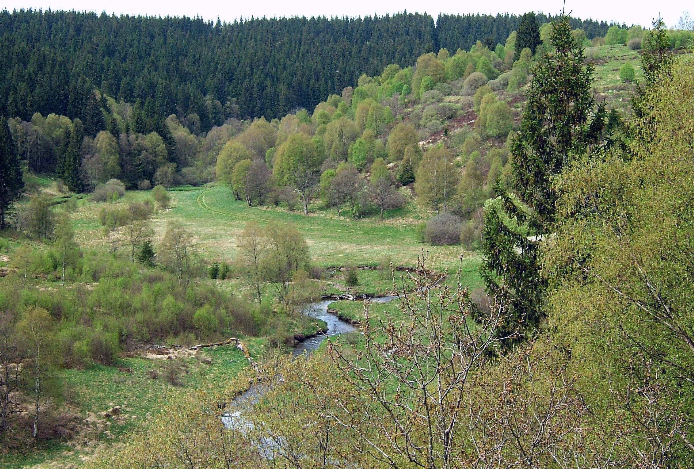 Oberes Perlenbachtal -– Blick vom Bieleifelsen in nordwestliche Richtung auf den Galgenberg